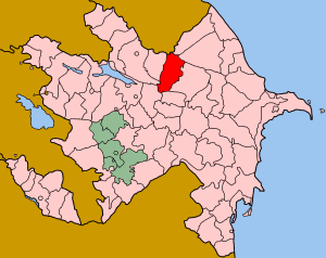 Map of Azerbaijan showing Qabala (Qəbələ) rayon.